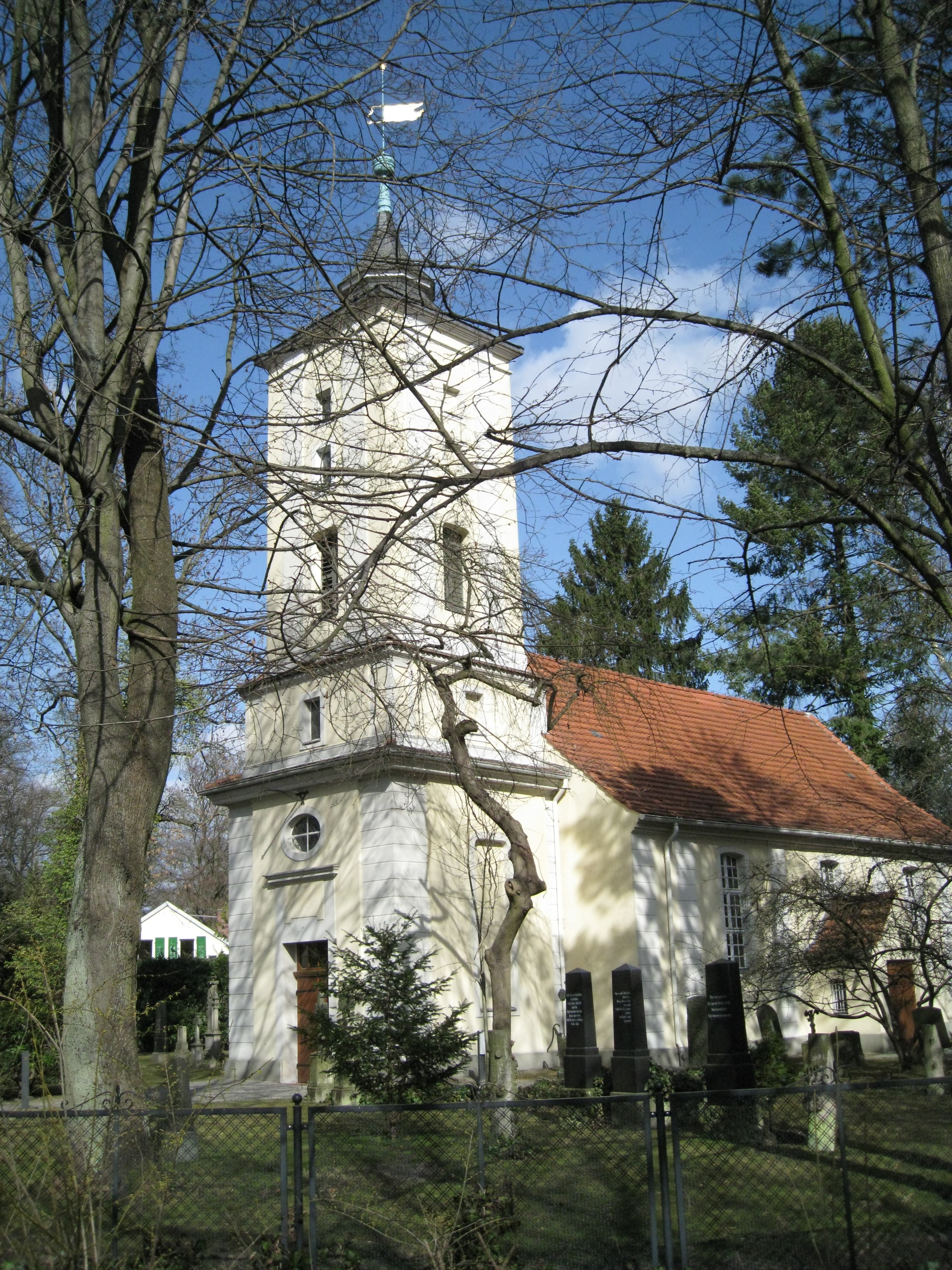 Dorfkirche Heiligensee auf der Dorfaue